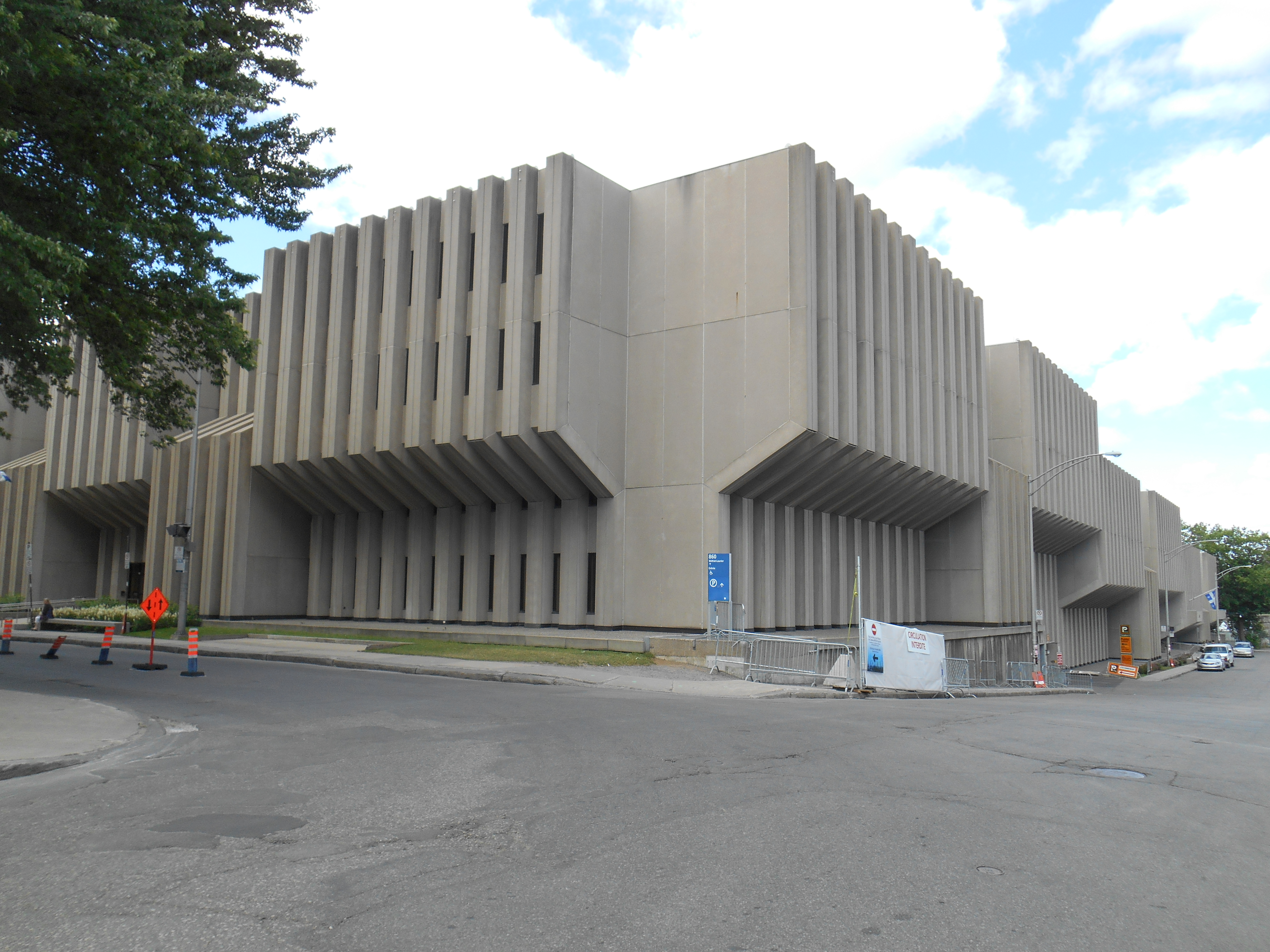 Édifice Jean-Talon, 875, Grande Allée Est, Québec